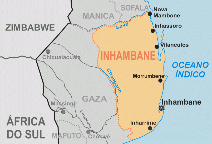 Mapa da Província de Inhambane, em Moçambique - feita para a Wikipédia por André Koehne